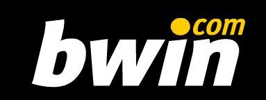 BWIN